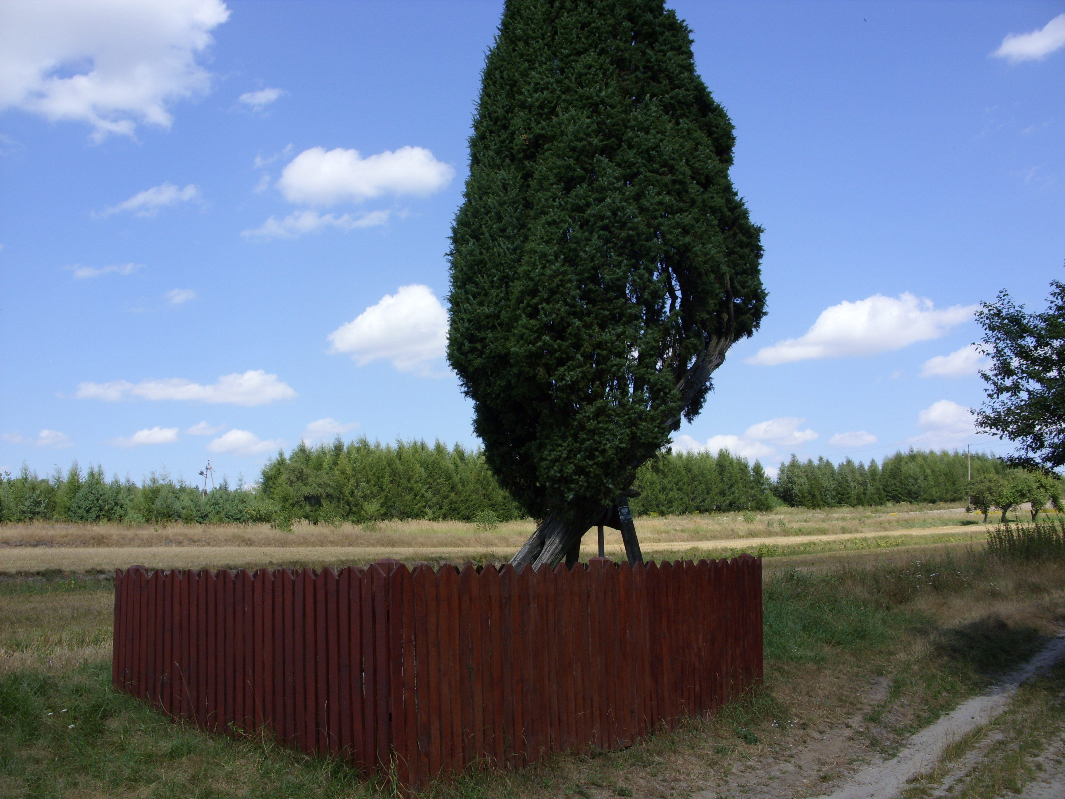 Bełżec. Jałowiec pospolity (Juniperus communis) o obwodzie 92 cm i wysokość 7,5 m. Pomnik przyrody. Liczący około 200 lat. W 2008 roku został jednym z laureatów plebiscytu „Siedmiu atrakcji Zamojszczyzny”.